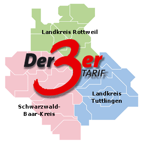 Logo Regionale Tarif Kooperation